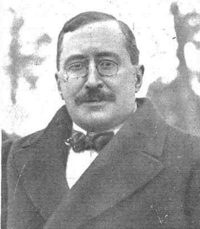 Fotografía de Mariano de Cavia.CAMPÚA